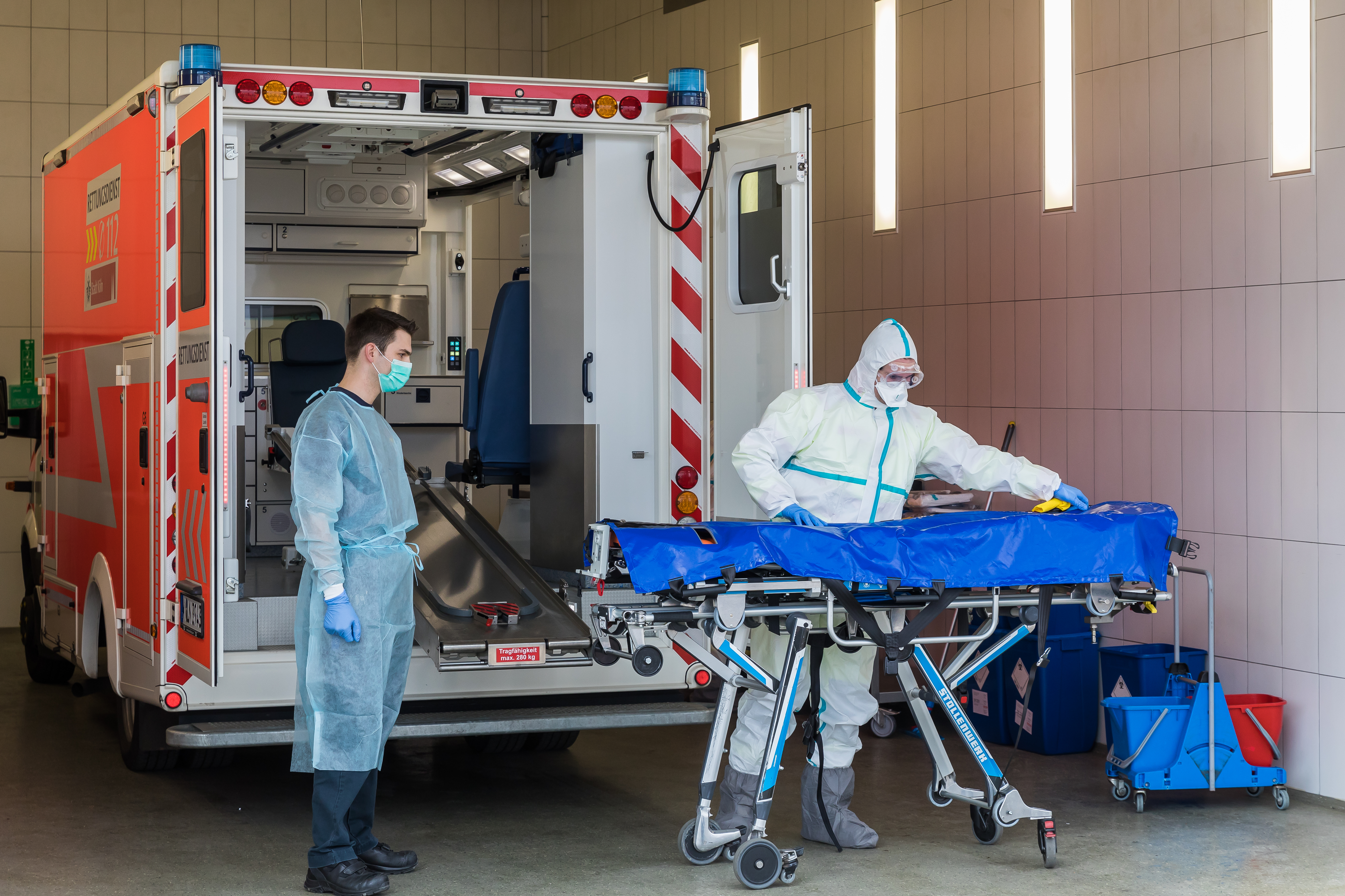 Rettungsdienst der Stadt Köln - Desinfektion eines Rettungswagen, Feuerwache 5, Köln-Weidenpesch